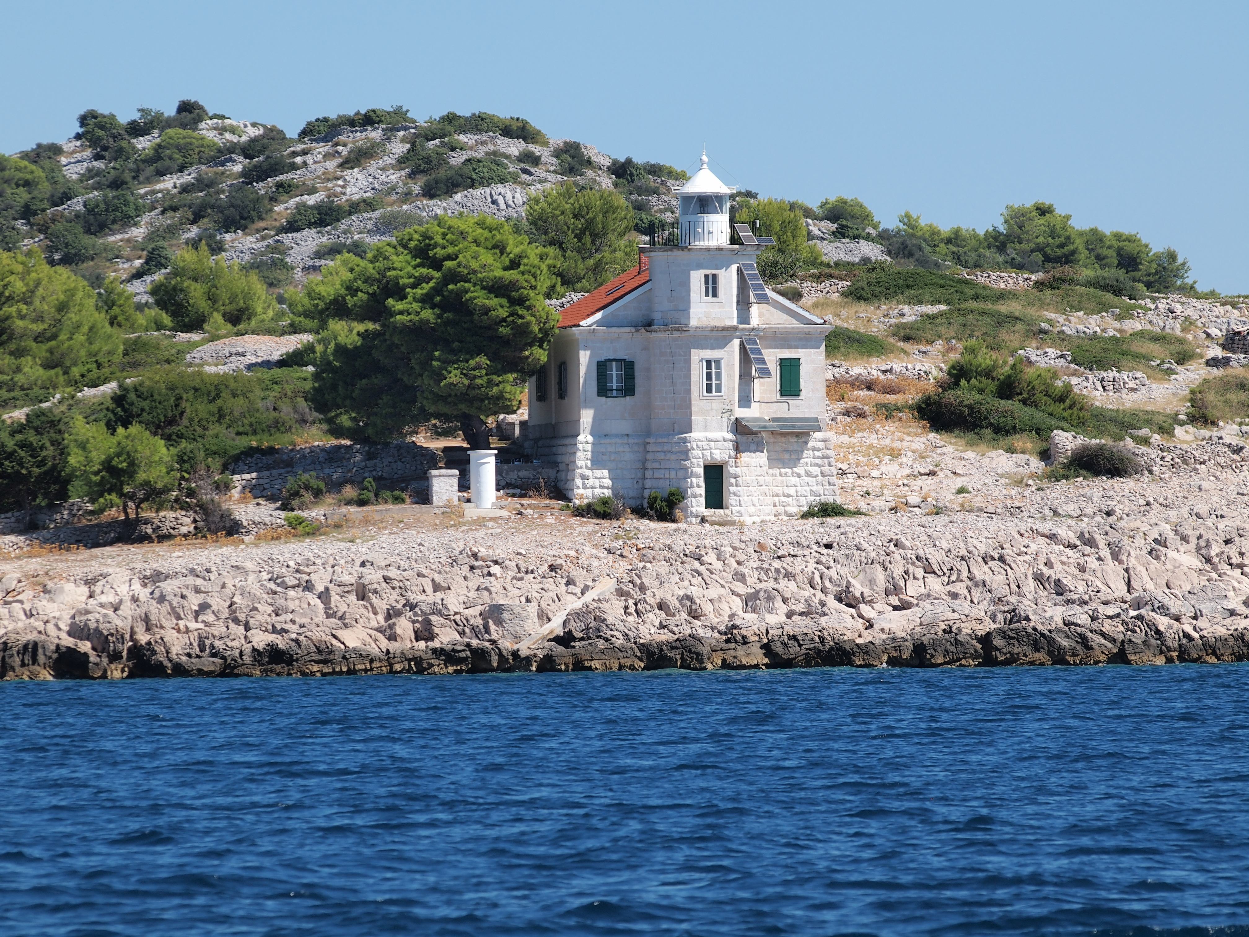 Leuchtturm auf einer kleinen Insel nordwestlich der Insel Murter, Kroatien, erbaut 1886, Standort Object location43° 49′ 31.67″ N, 15° 33′ 32.13″ E Kennung: Fl(3) W. 10s 19m 9sm